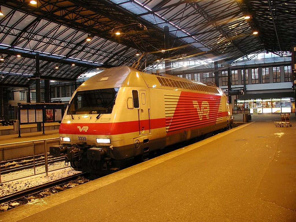 Finnische E-Lok 3239 (SR-2) im Hbf Helsinki